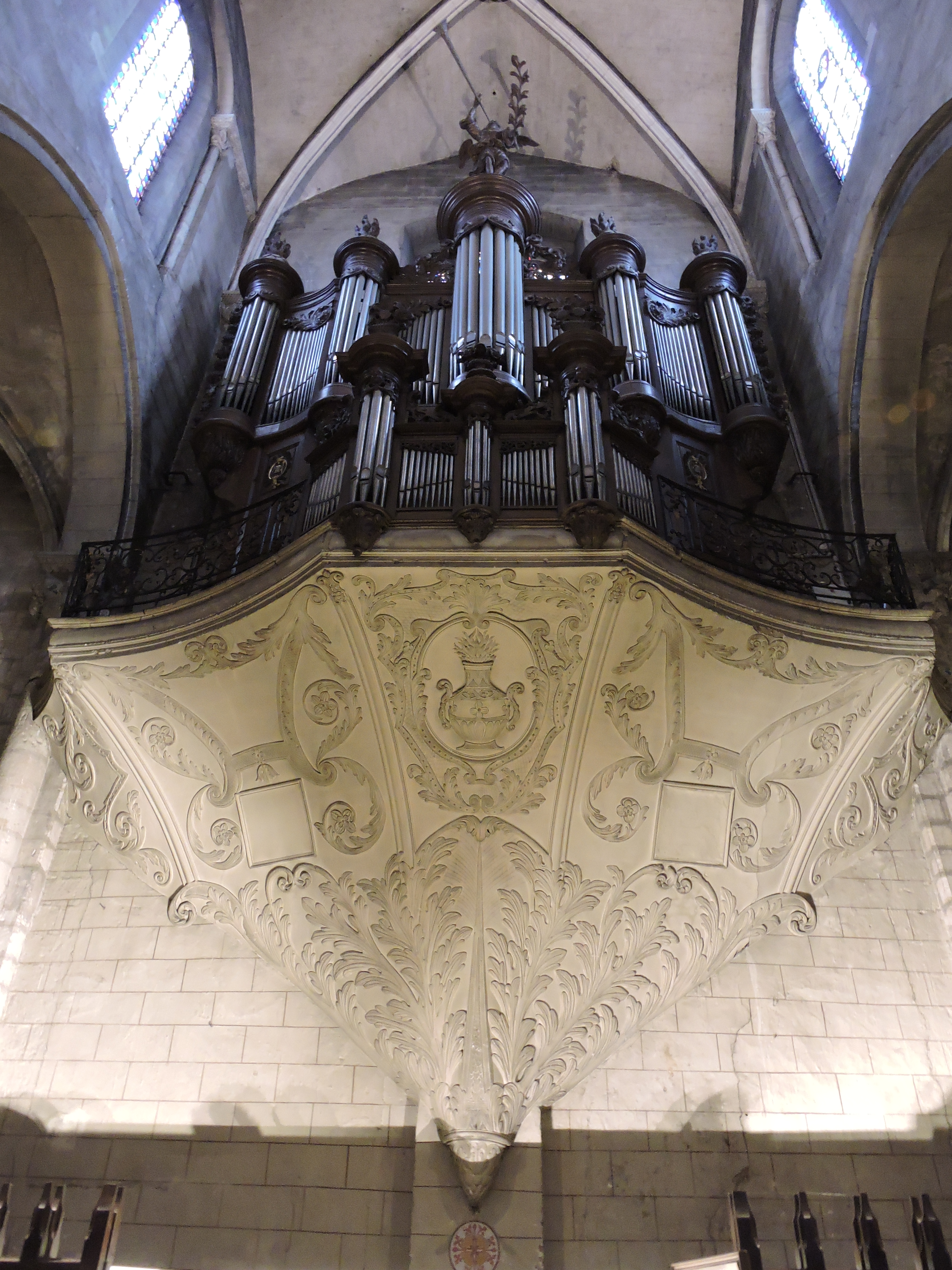 Albi (Tarn France), collégiale Saint Salvi, gigantesque piédouche supportant le buffet d'orgue de 1736 dû à Christophe Moucherel et contenant un instrument de Maurice Puget de 1931.